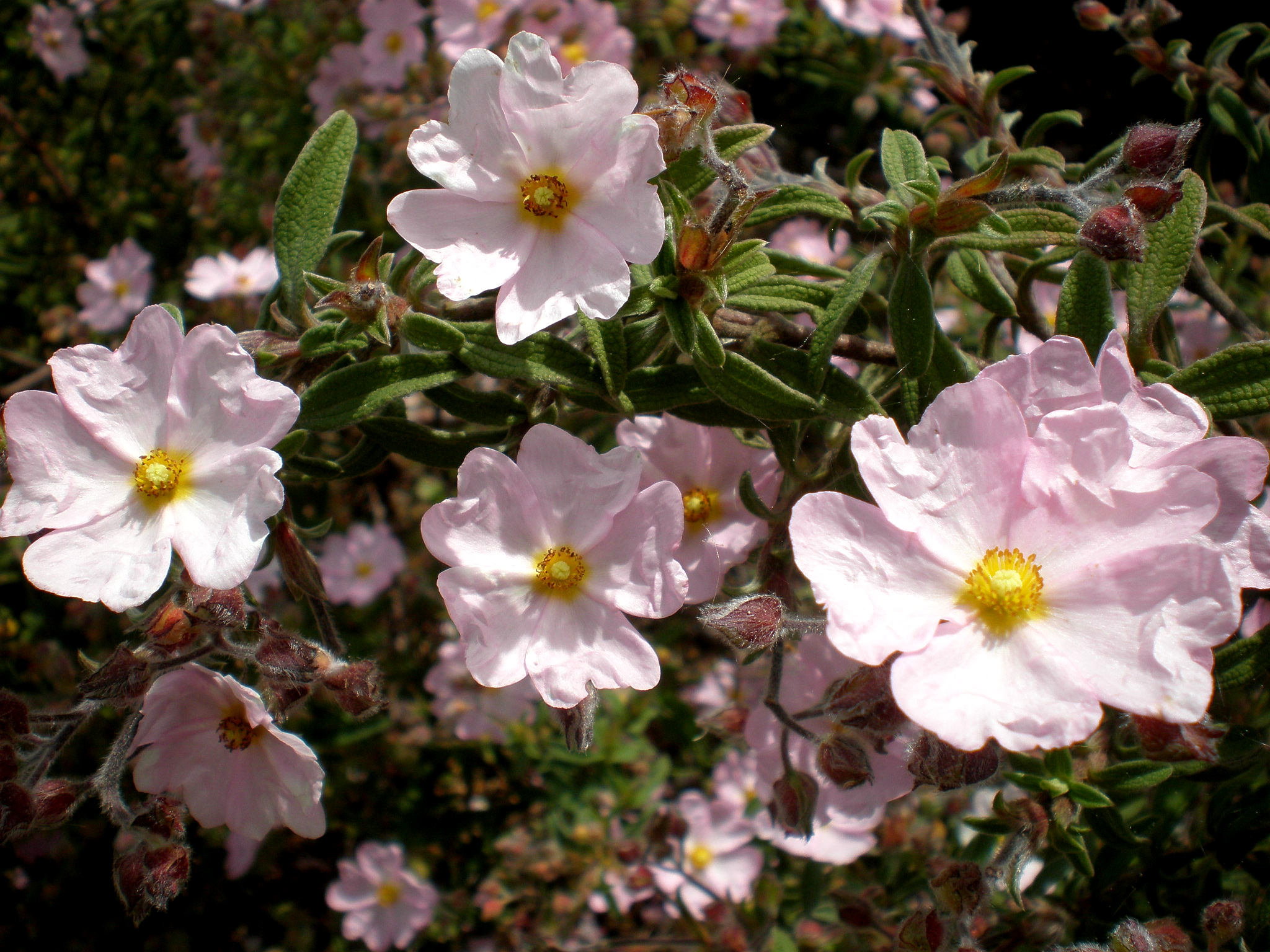 Jardín Botánico de Barcelona.